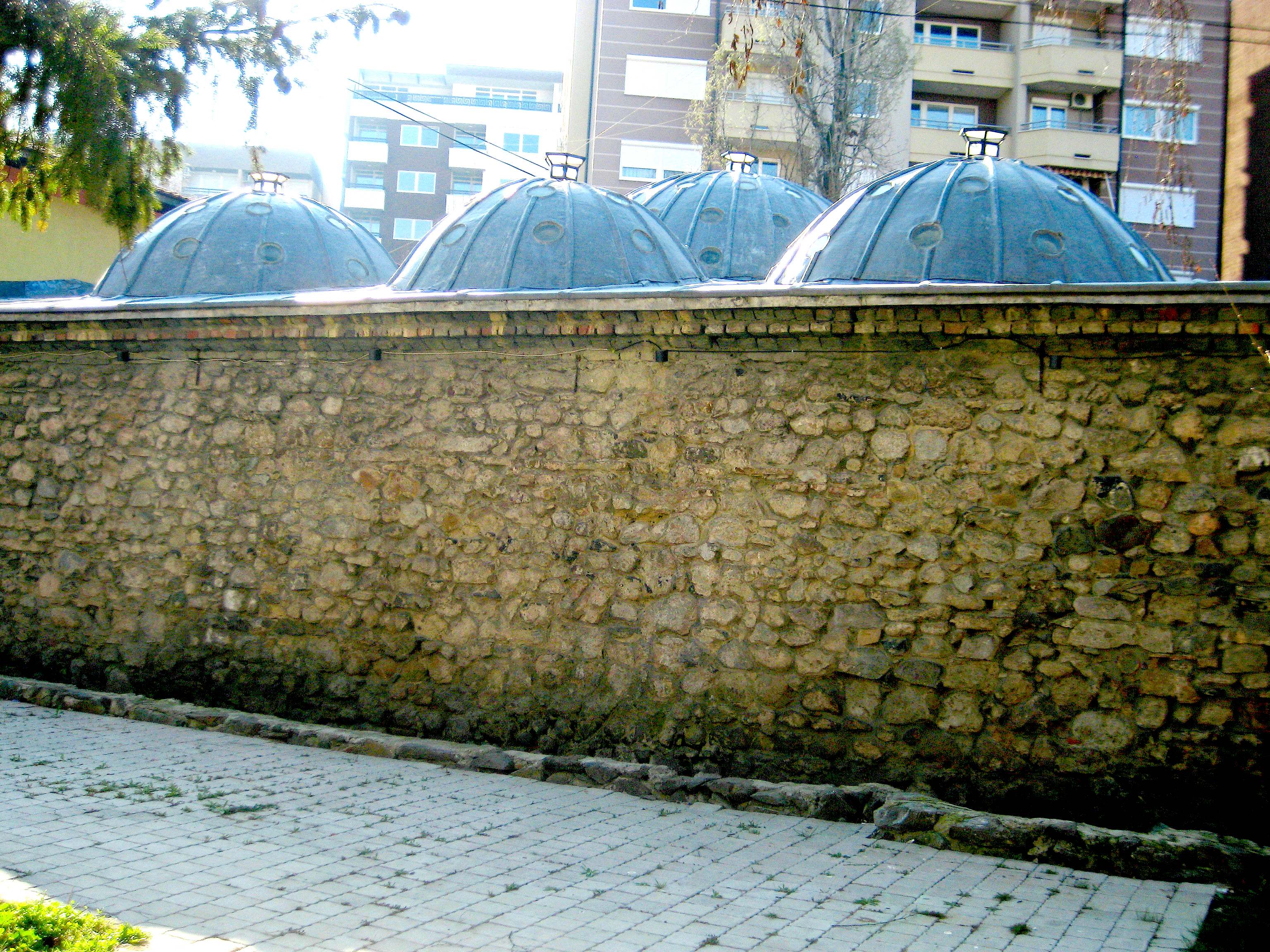 Ndërtesa e Hamamit të Vjetër